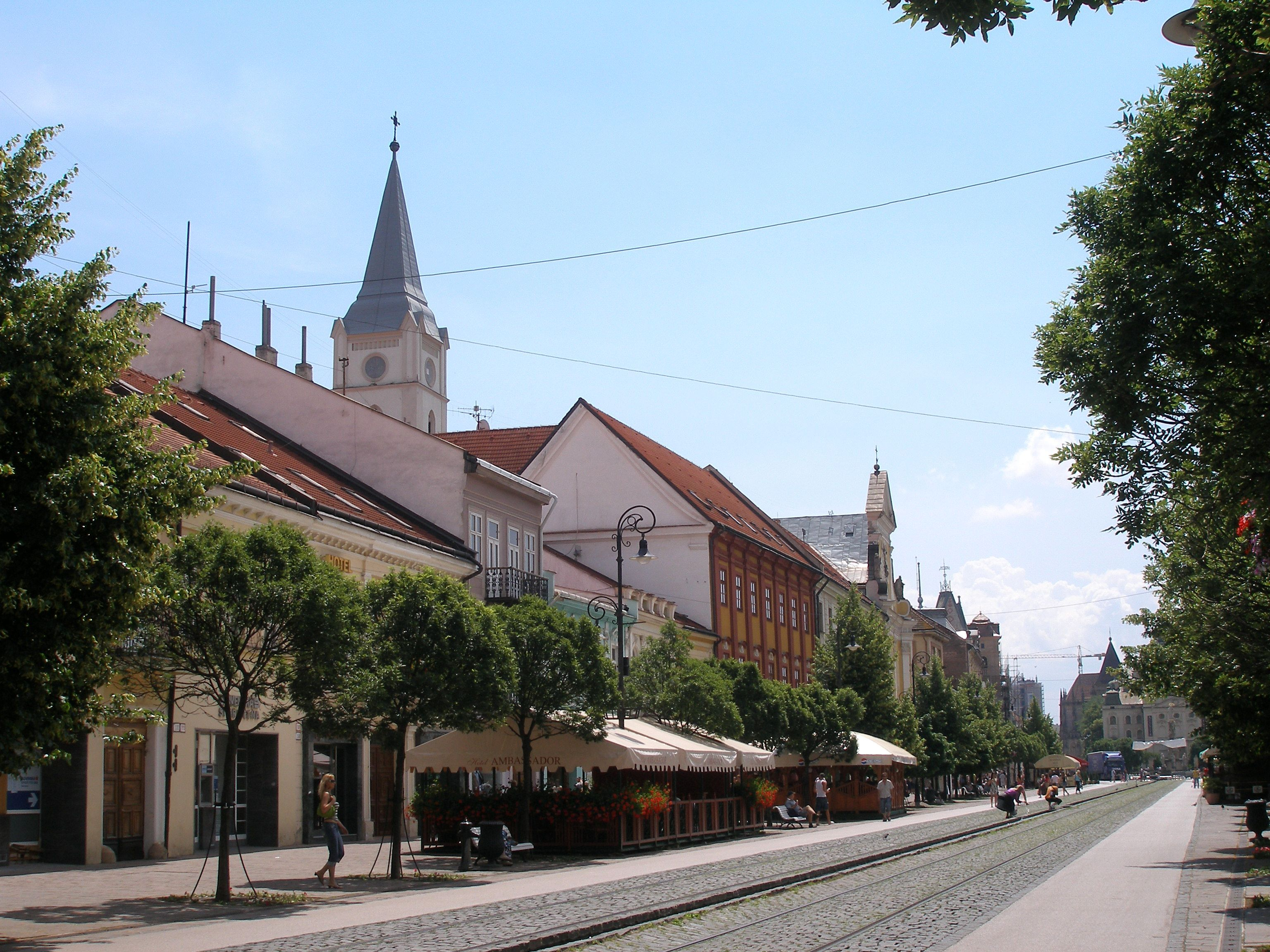 Centrum mesta Košice